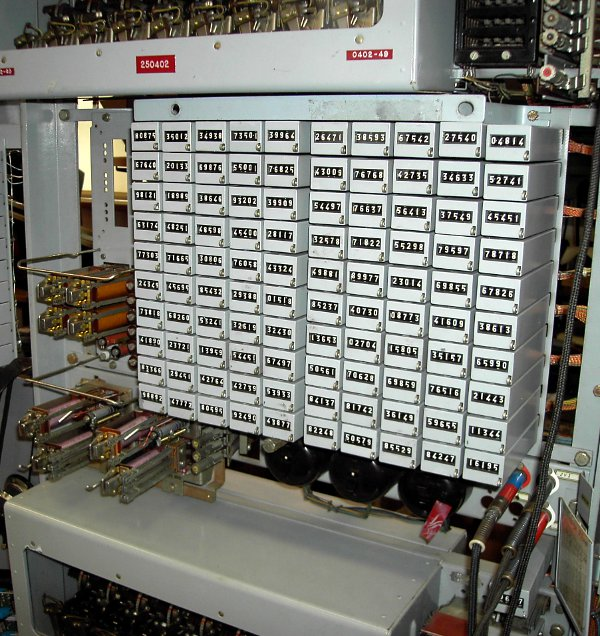 I. Vorwähler Gestell mit Gebührenzähler Feld System 50